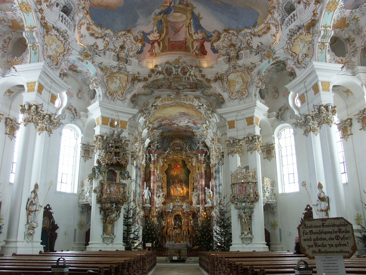 Wies church (Wieskirche), Germany